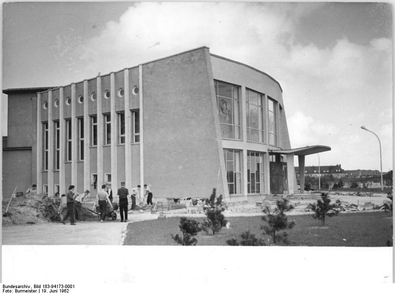 Rostock, Schiffbautechnische Fakultät , Großer Hörsaal Zentralbild Burmeister-15.6.1962 Sd-At.Vorbereitung Ostseewoche: Zu den modernsten Bauten Rostocks gehört die Schiffbautechnische Fakultät der Universität Rostock, die einen rieseigen Komplex in der neuen Rostocker Südstadt einnimmt. Die Schiffbautechnische Fakultät ist die größte ihrer Art in Europa und ist mit dem modernsten wissenschaftlichen Geräten für Lehre und Forschung auf dem Gebiet der Schiffbautechnik ausgerüstet, u.a. mit einer Strömungshalle und einem Maschinenprüfstand. UBz: Blick auf den großen Hörsaal der Schiffbautechnischen Fakultät Rostock.